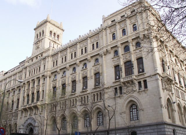 Cuartel General de la Armada. Paseo del Prado 3, c/ Montalbán 2. Construido, al igual que el Palacio de Telecomunicaciones, en terrenos del Parque del Buen Retiro entre 1917 y 1925, según proyecto de Espeliús (1915). Colindante en el Paseo del Prado con el Museo Naval